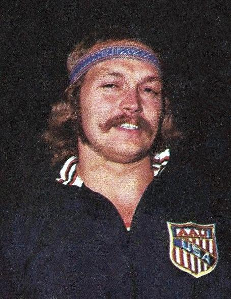 CAMPIONI dello SPORT 1973/74-Figurina n.59- FEUERBACH - USA -ATL.LEGGERA